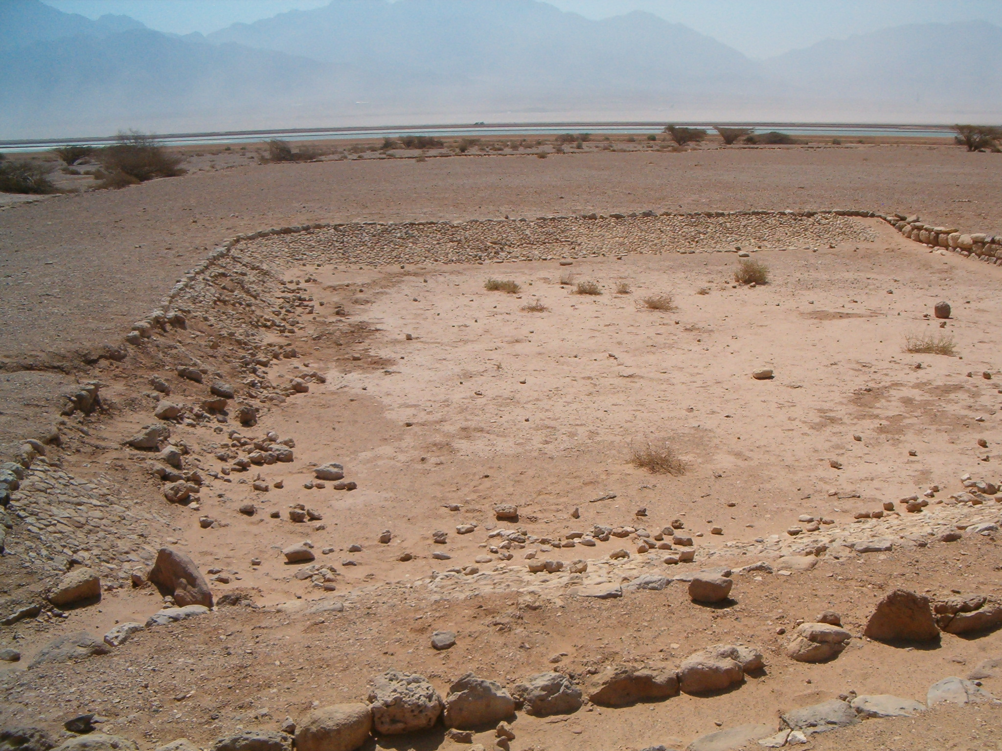 בריכת אגירת מים עתיקה בעברונה.